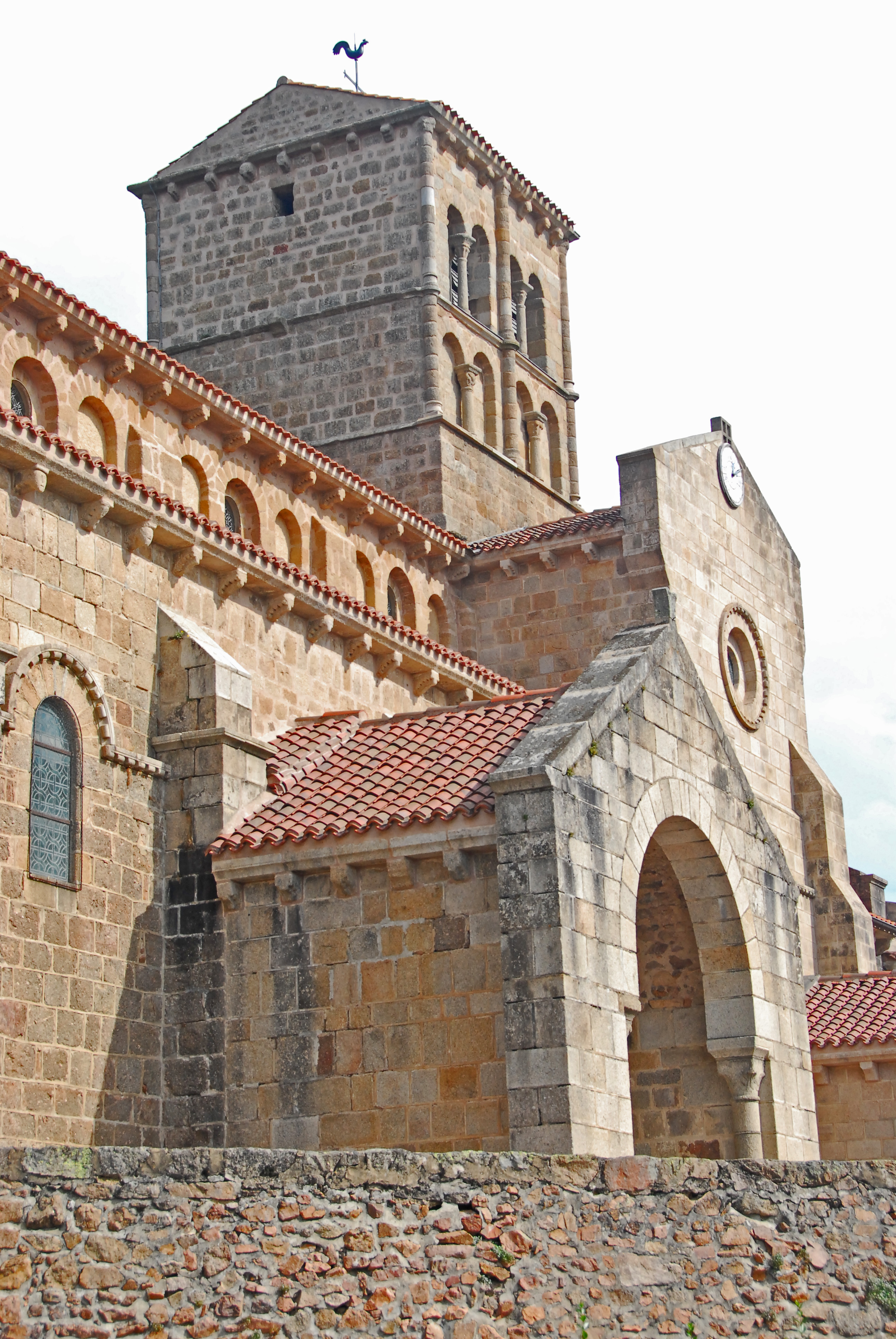 N.-D. de Châtel-Montagne, Portalvorbau, südl. Narthex von SW